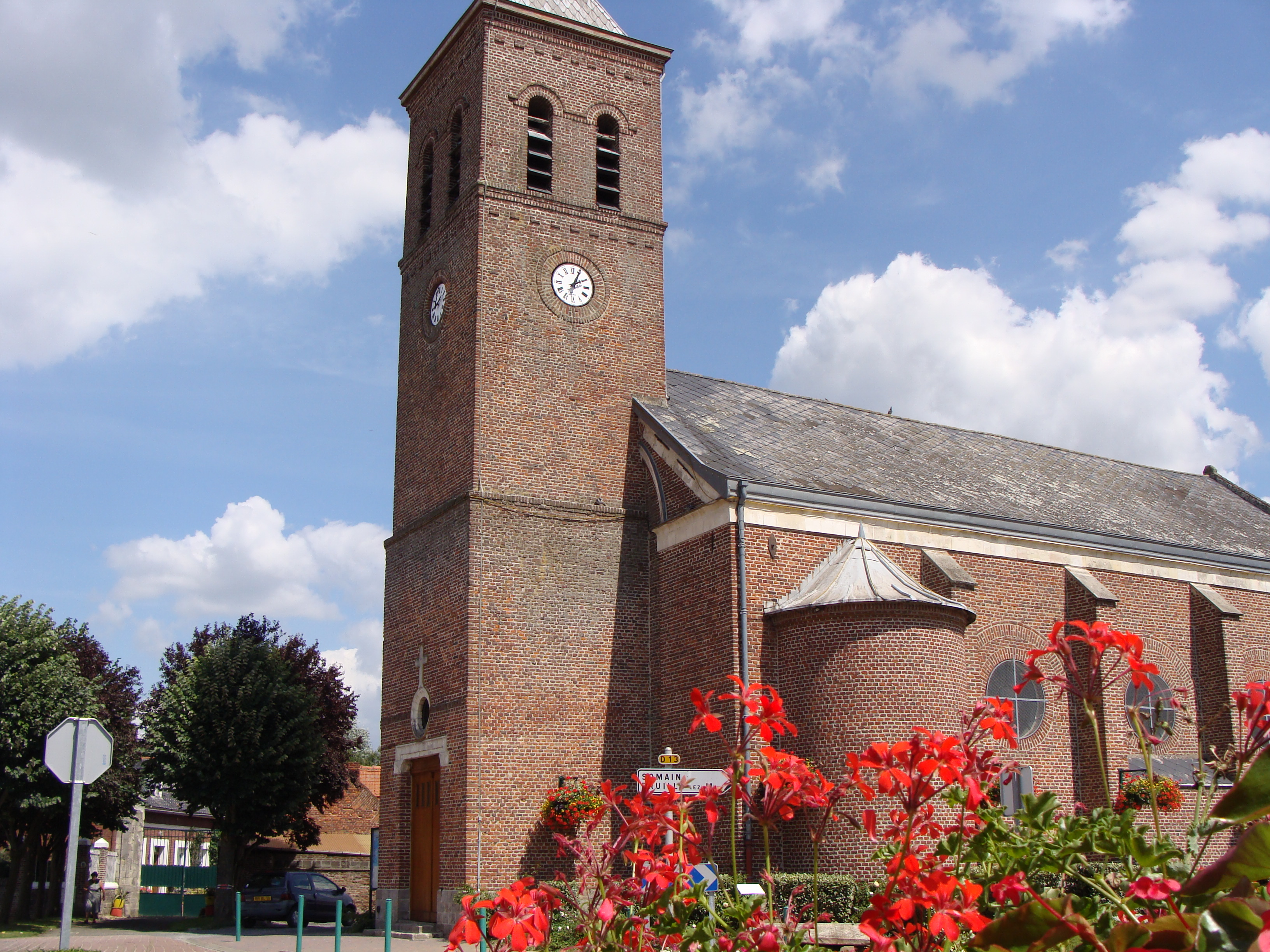 Église d'Ecaillon (Nord) - France